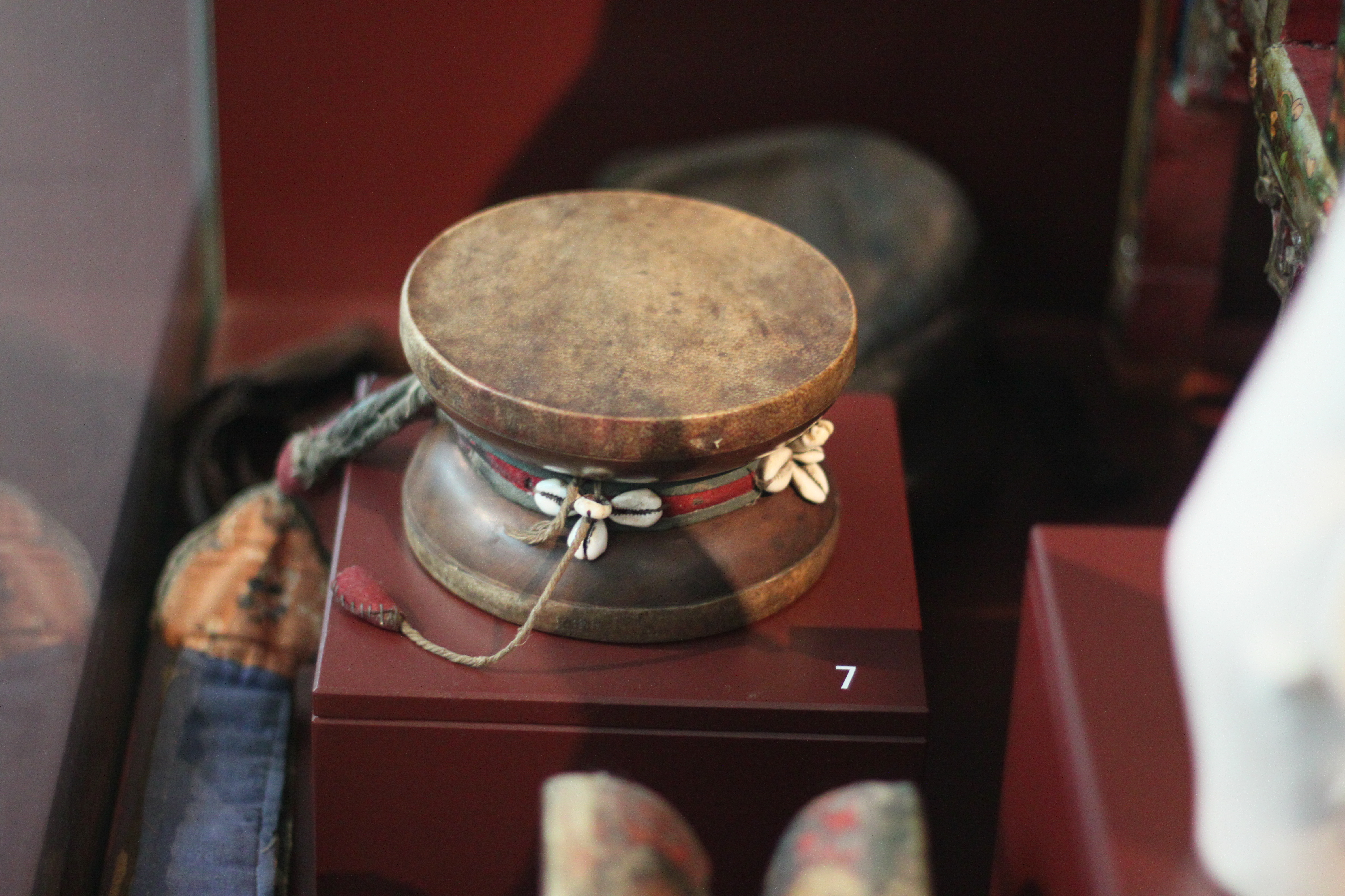 Damaru; im Überseemuseum